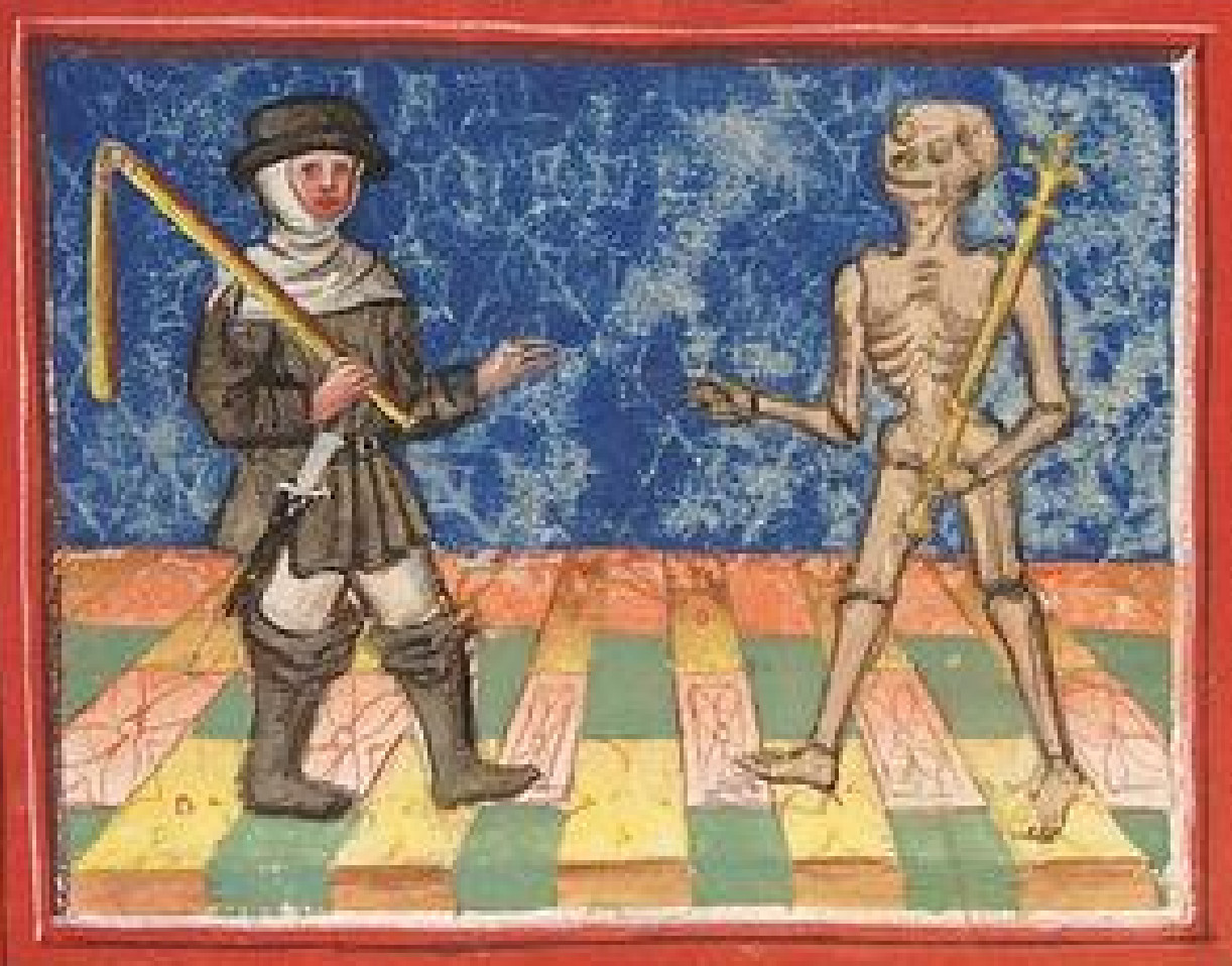 Icon from Der Ackermann aus Böhmen, Cod. Pal. germ. 76